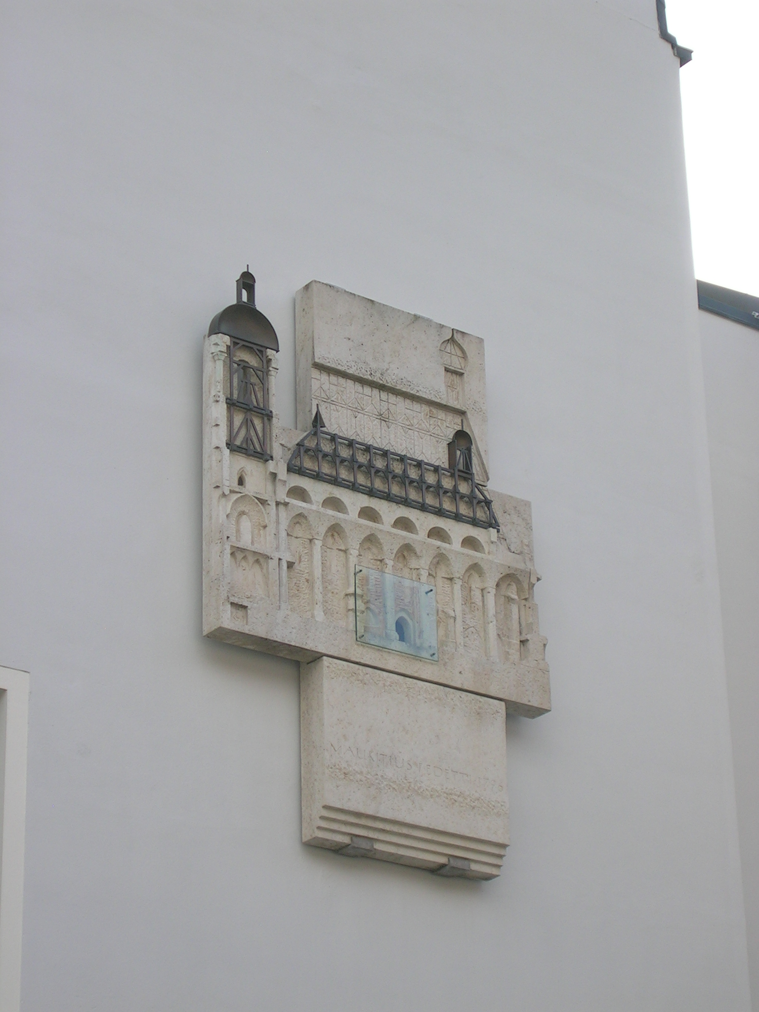 Erinnerungstafel an die 1818 abgebrochene Kollegiatstiftskirche Zu Unser Lieben Frau am Haus Marktplatz 7 in Eichstätt